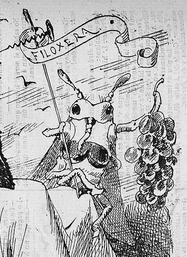 La situació d'Espanya.